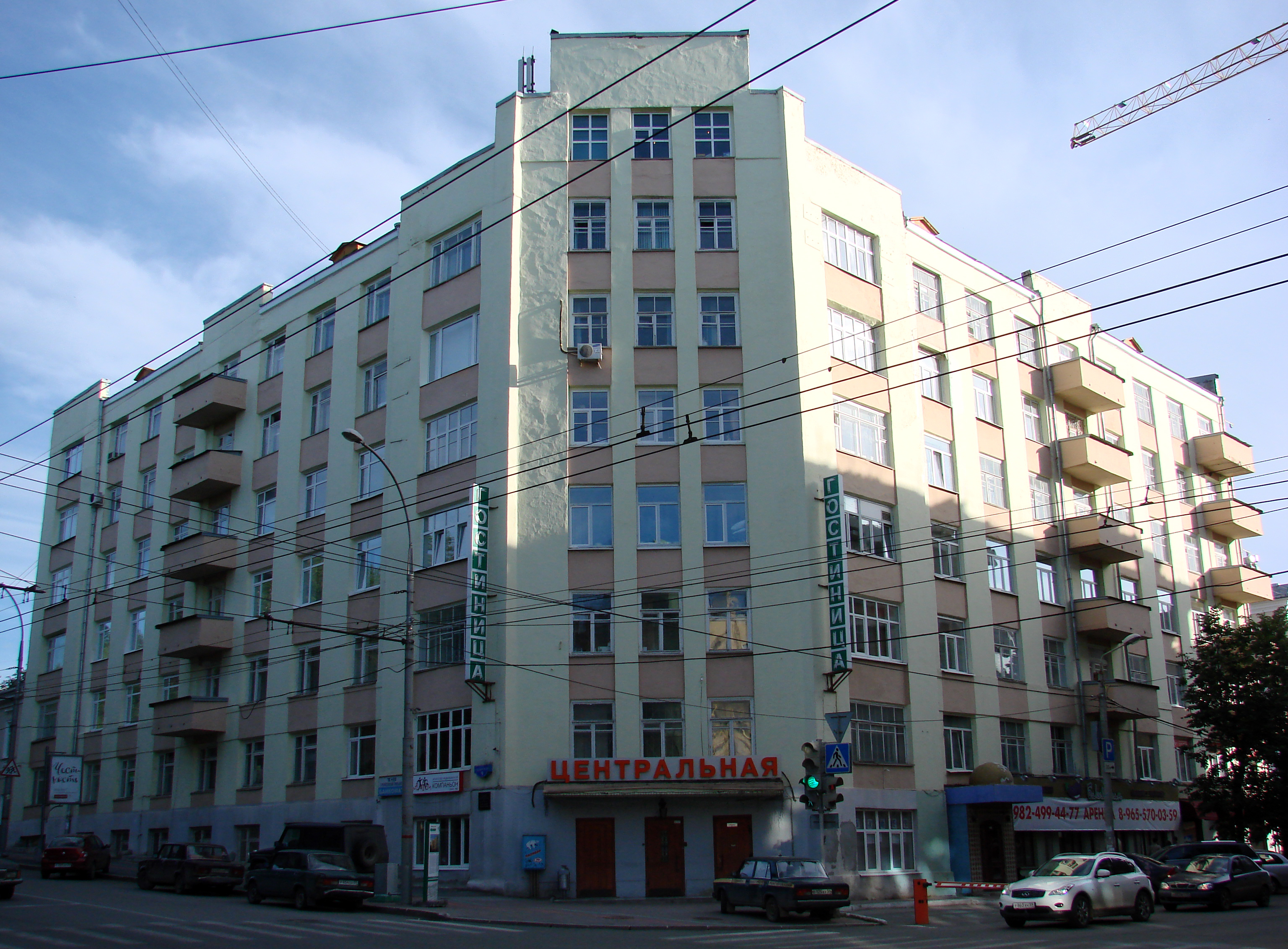 Здание гостиницы "Центральная" 1930-1933 гг., архитектор Ф.Е.Морогов Пермь, улица Сибирская, 9